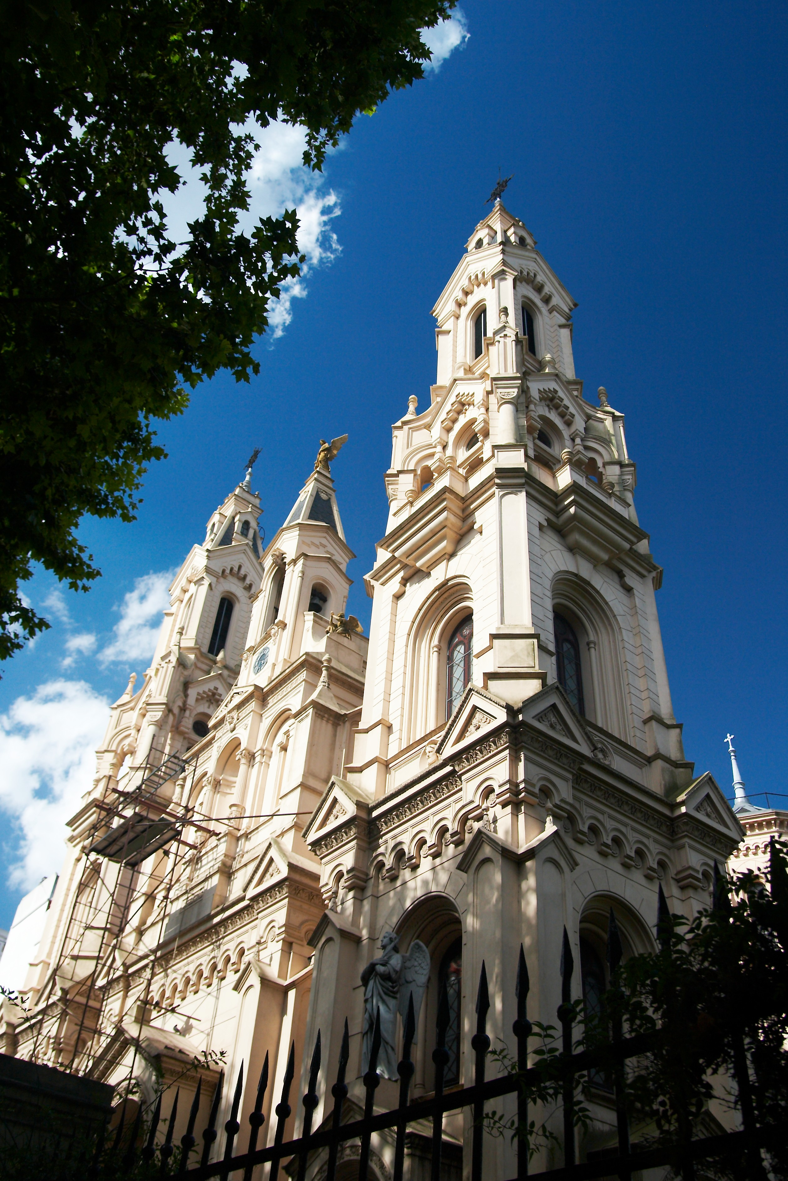 Iglesia Santa Felicitas, ubicada en calle Isabel La Católica 520, entre las calles Brandsen y Aristóbulo del Valle, frente a la Plaza Colombia, barrio de Barracas, Buenos Aires, Argentina.